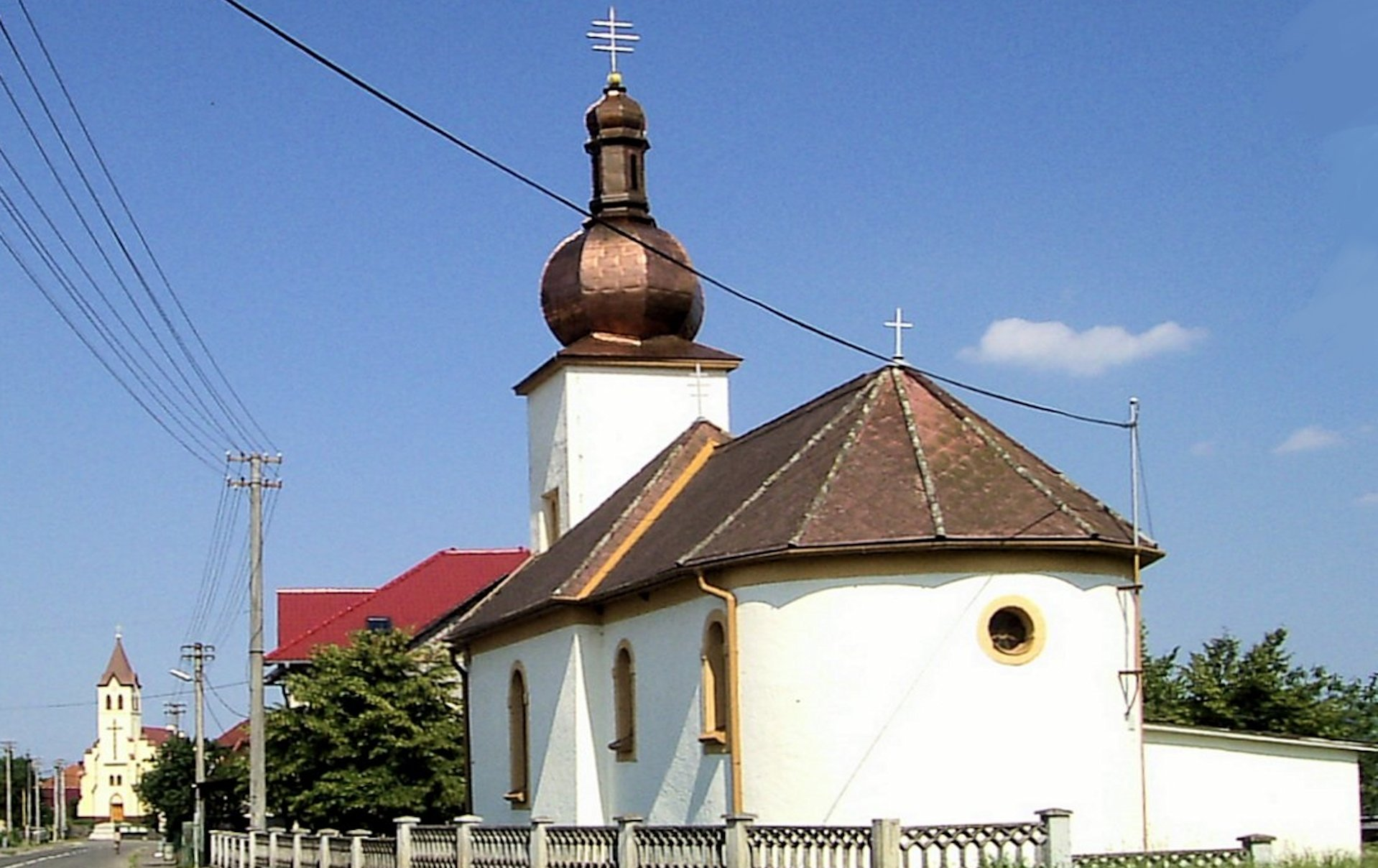 Vechec, Grécko-katolícky a Rímsko-katolícky kostol